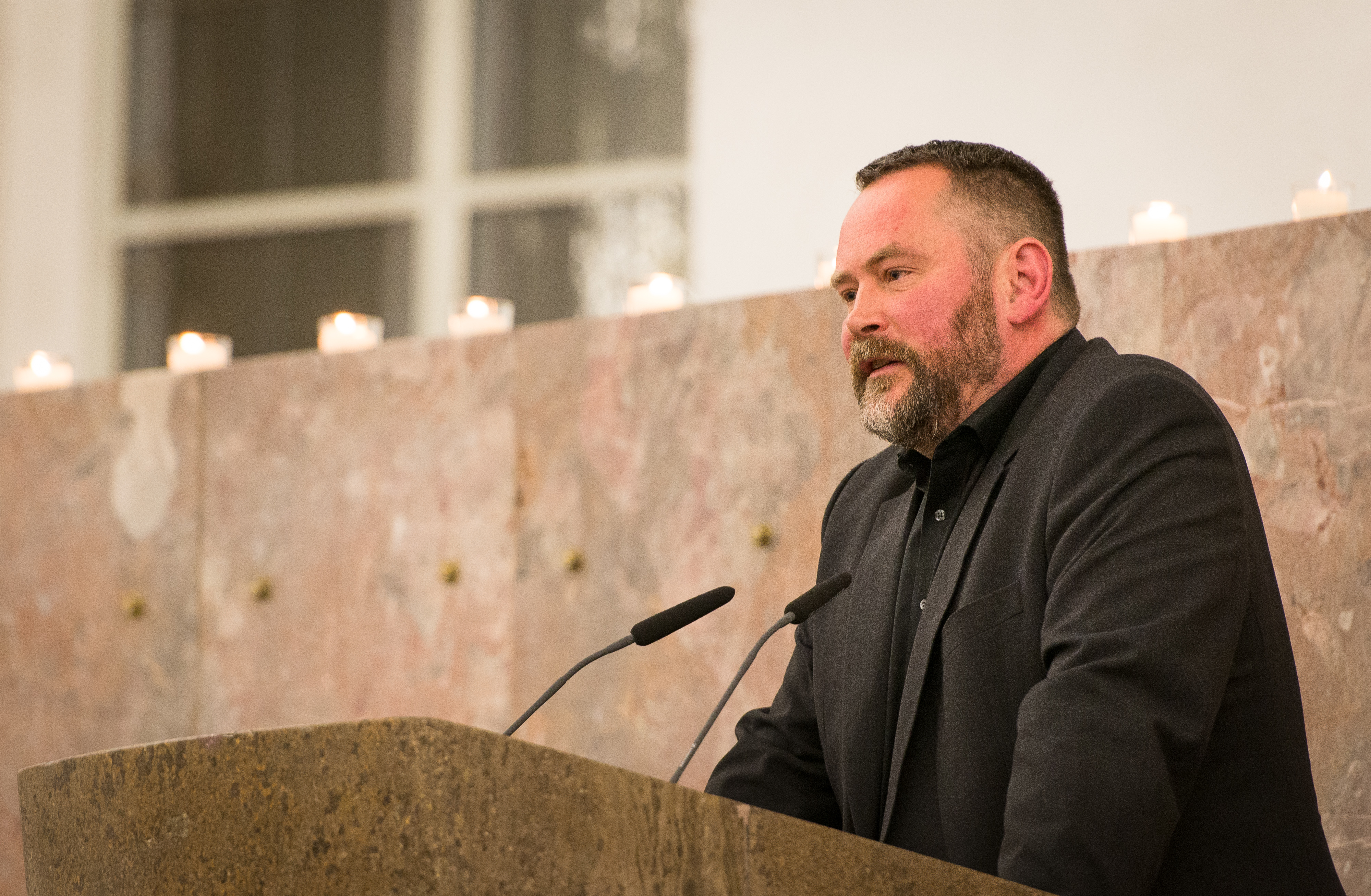 Stefan Niggemeier auf dem Welt-AIDS-Tag in der Paulskirche in Frankfurt am Main (Dezember 2014)